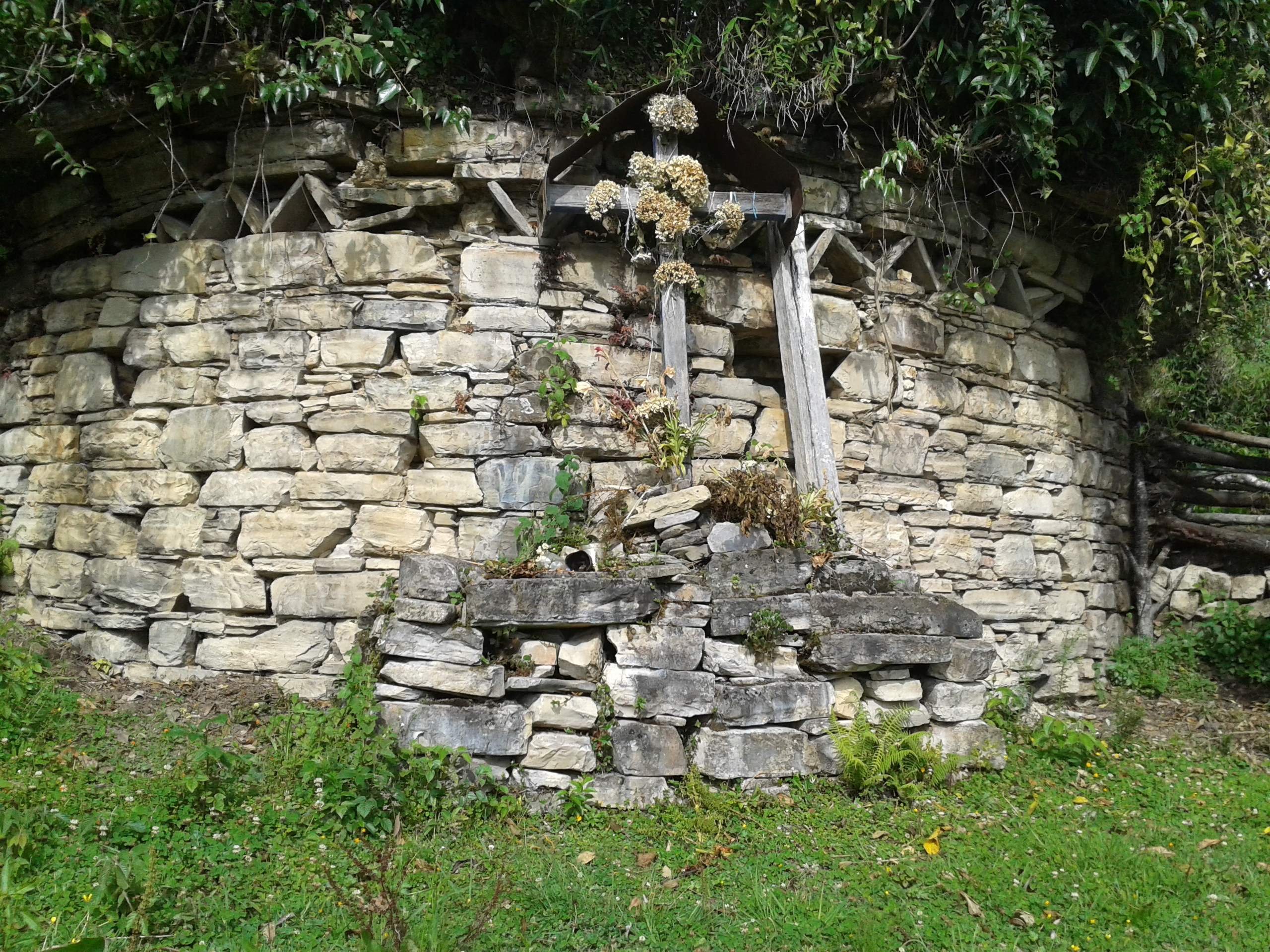 Primer edificio que se encuentra a la vista de Olan